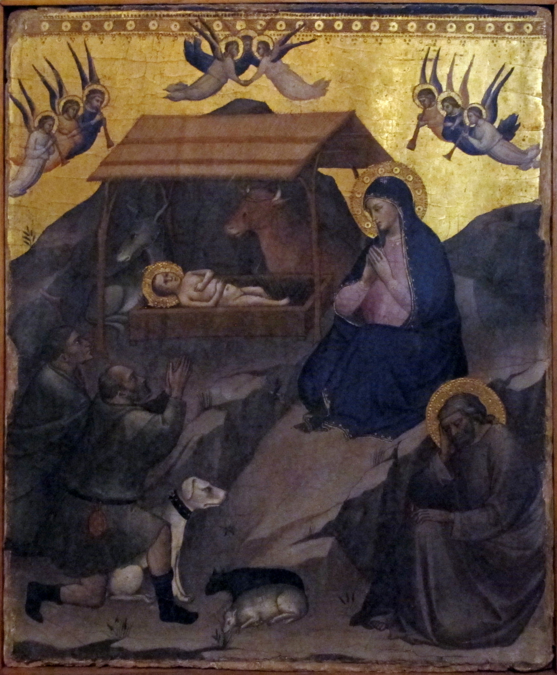 Pinacoteca Vaticana